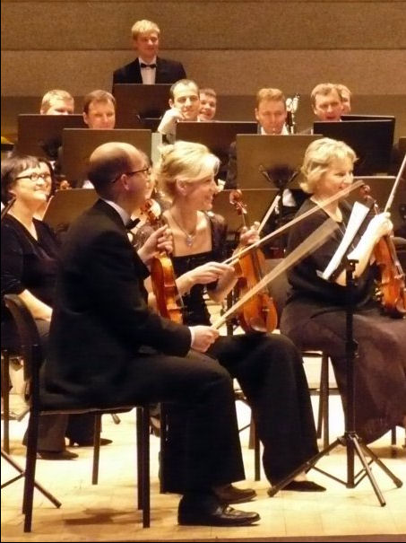 Orchestre National de Lituanie 2